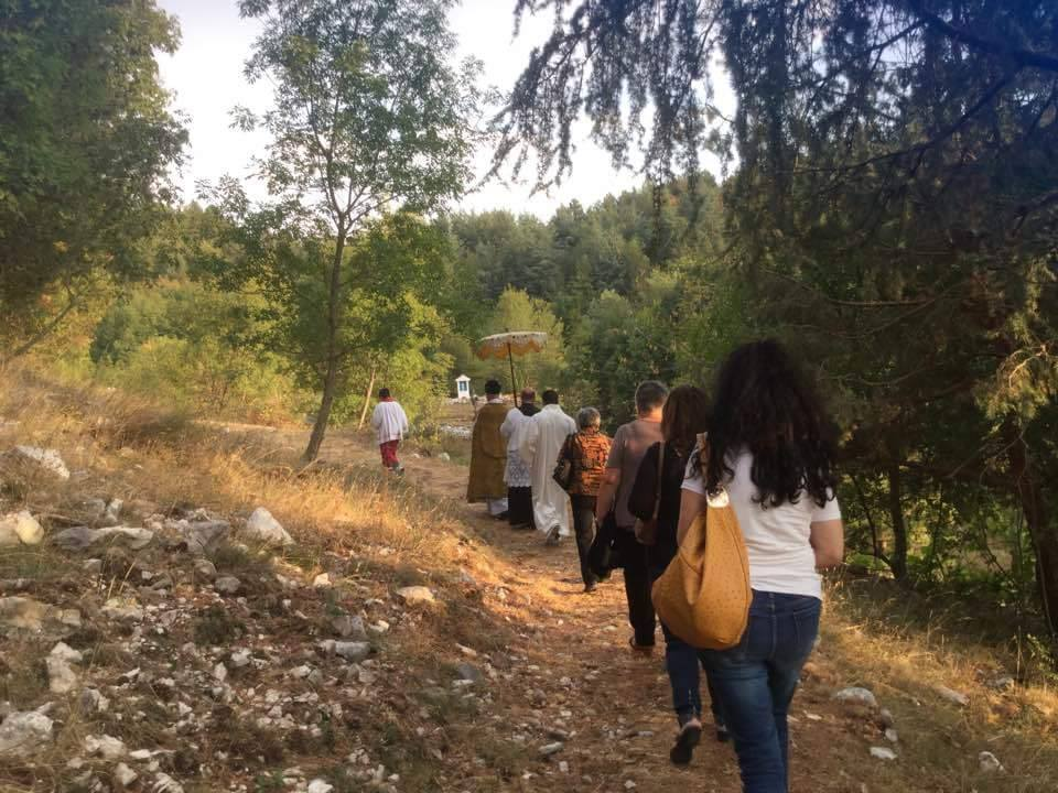 il sentiero delle XII stelle presso il santuario della Madonna del Carmine di Acquafondata